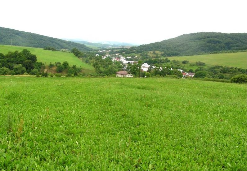 Celkový pohľad